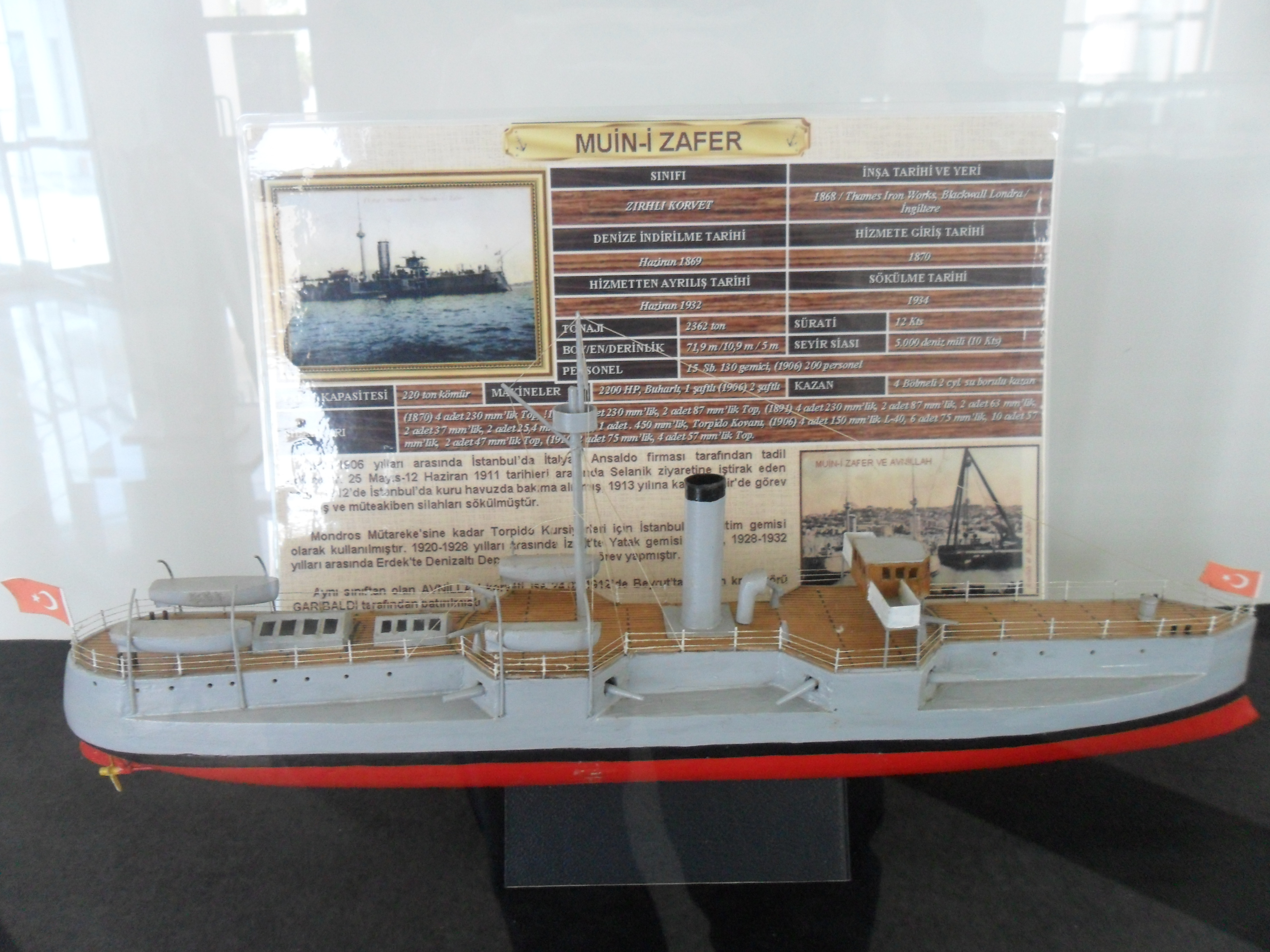 Mersin Deniz Müzesinde sergilenmekte olan Muin-i Zafer maketi.